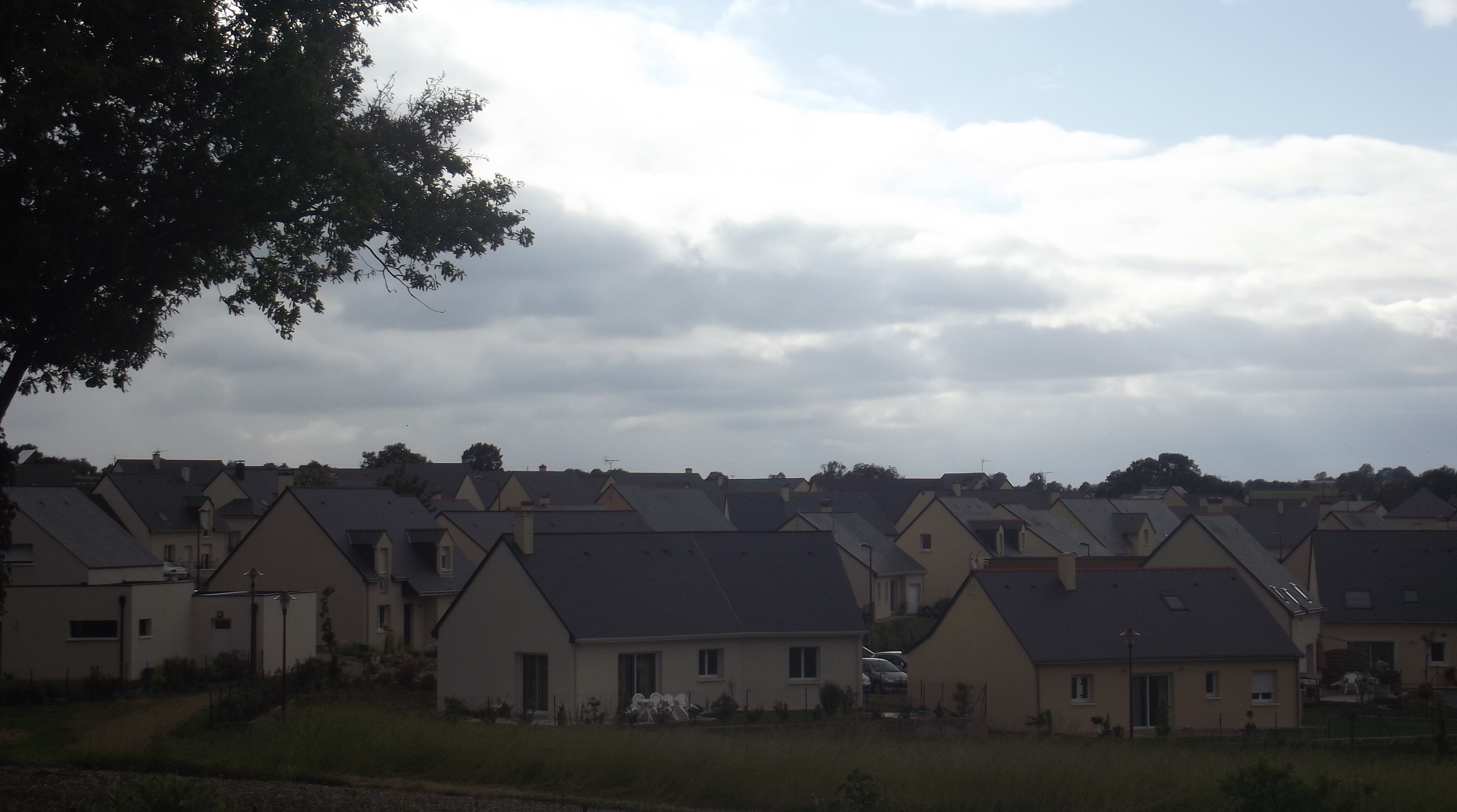 La Z.A.C. du Domaine des Chênes I à La Membrolle-sur-Longuenée (Maine-et-Loire), France